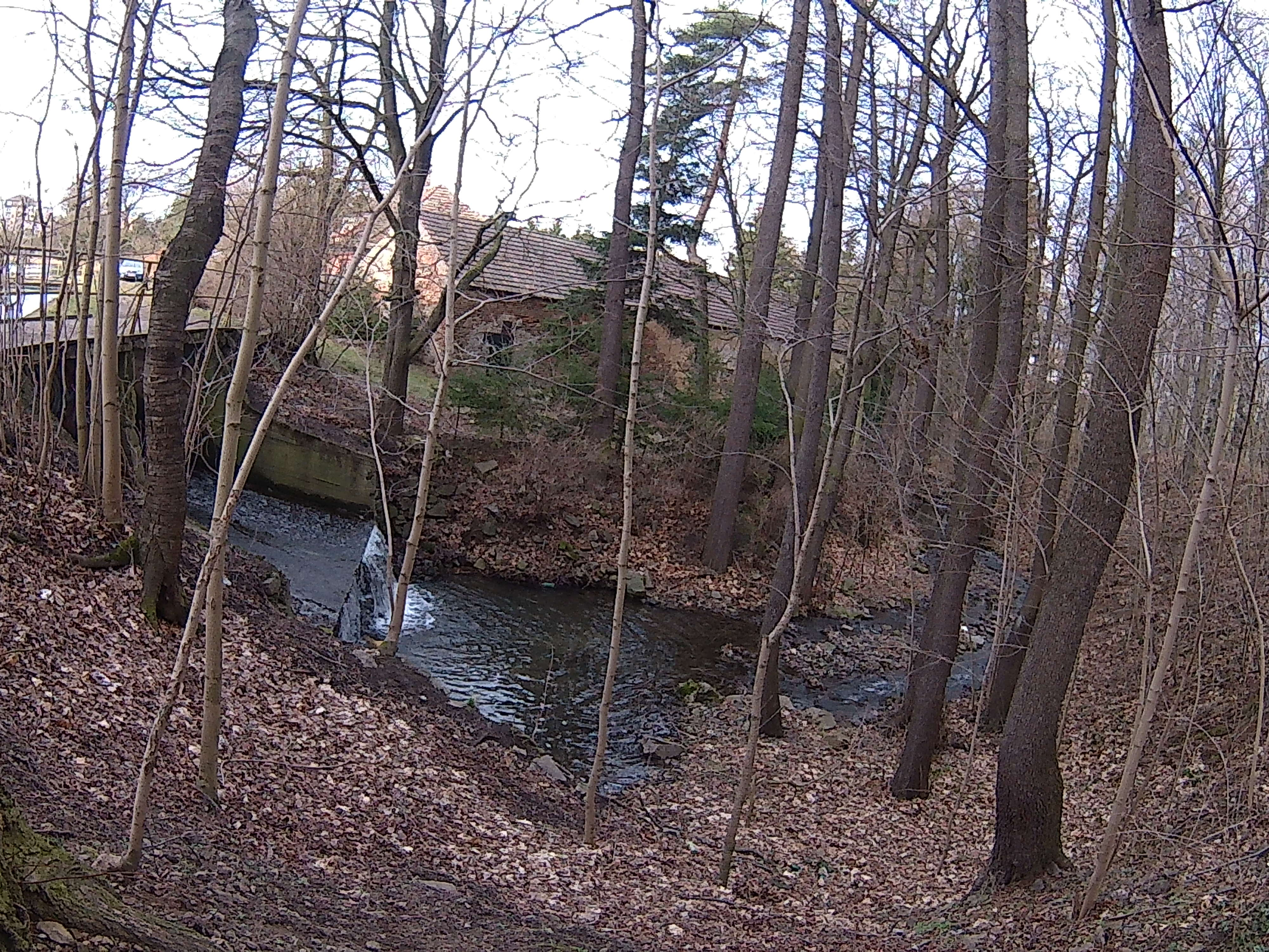 Fialův mlýn, ležící na Příbramském potoce